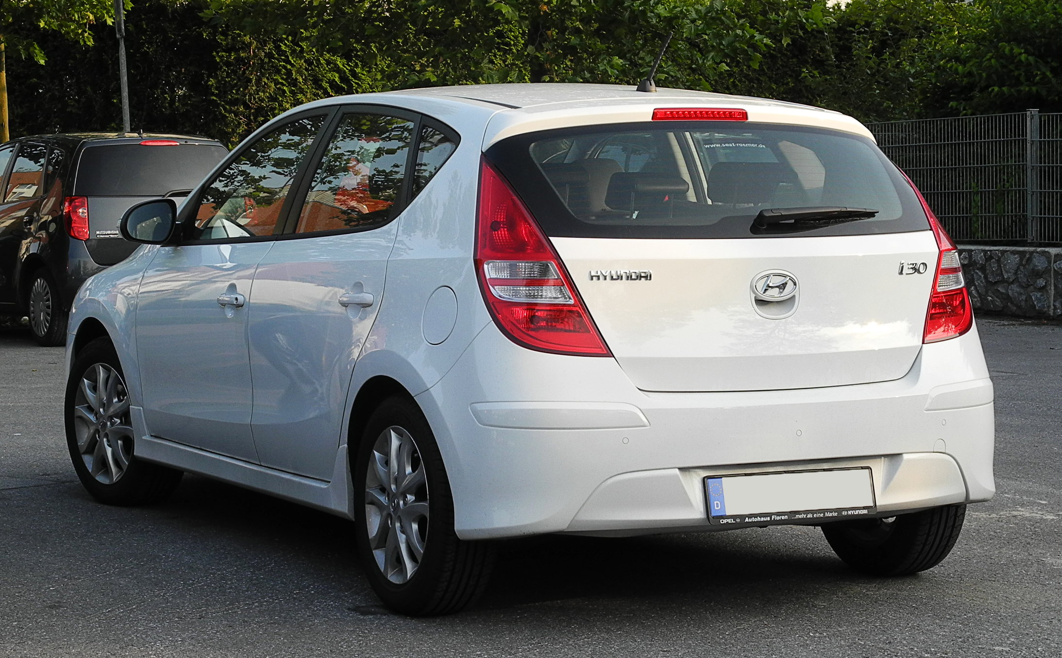 Hyundai i30 (Facelift)